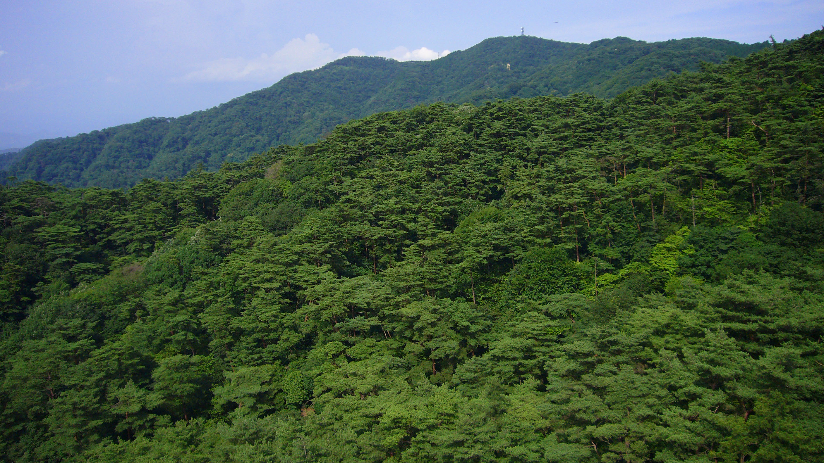 Mt.Rokko in Kobe, Japan